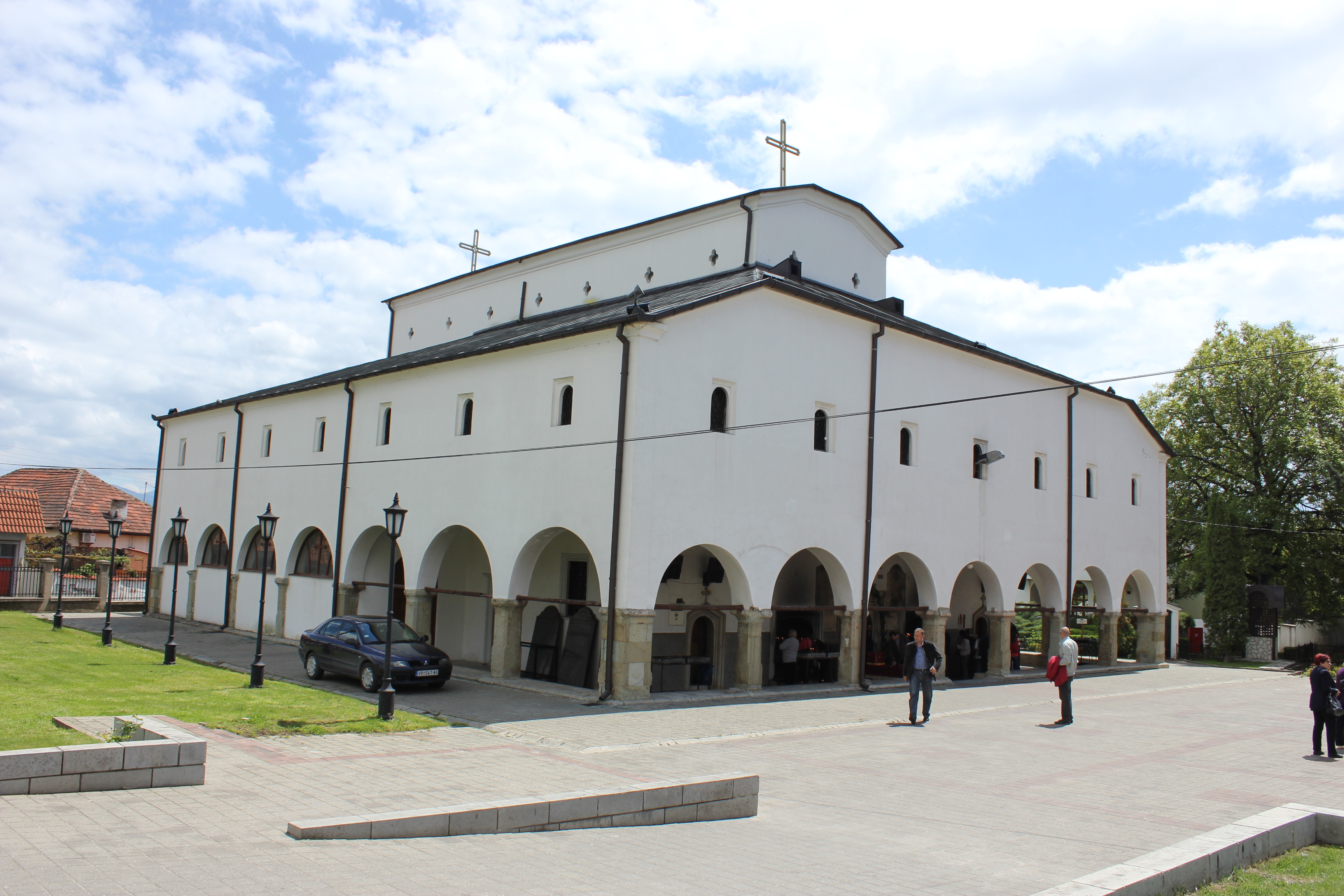 Съборната църква „Св. Троица" в град Враня, Сърбия.